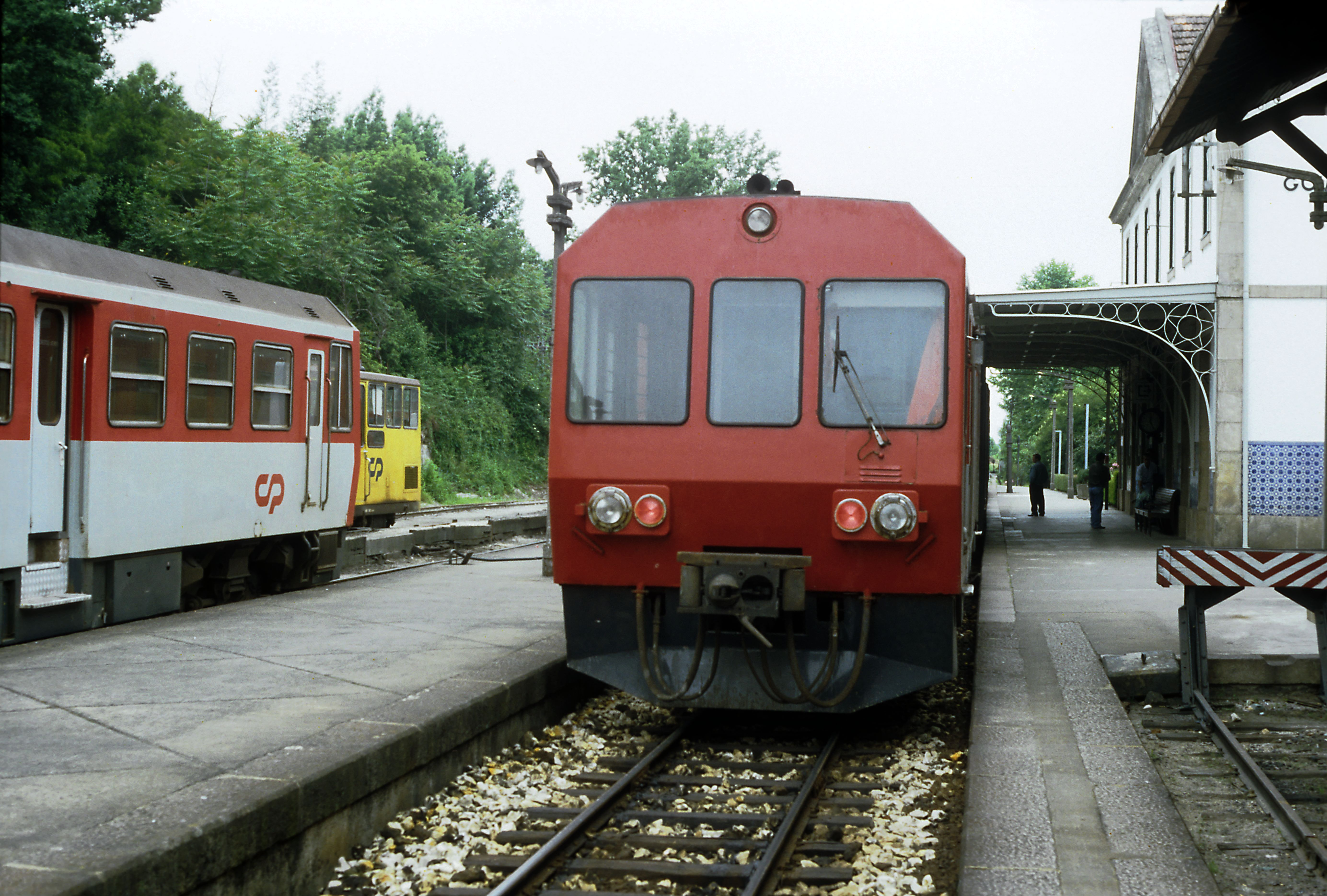 Bf Guimarães, Meterspurtriebzüge der Reihe 9600. Dass die Strecke geteilt und der Abschnitt Lousado–Guimarães auf Breitspur umgespurt und zusätzlich elektrifiziert werden würde, war zum Aufnahmezeitpunkt vollkommen unvorstellbar.